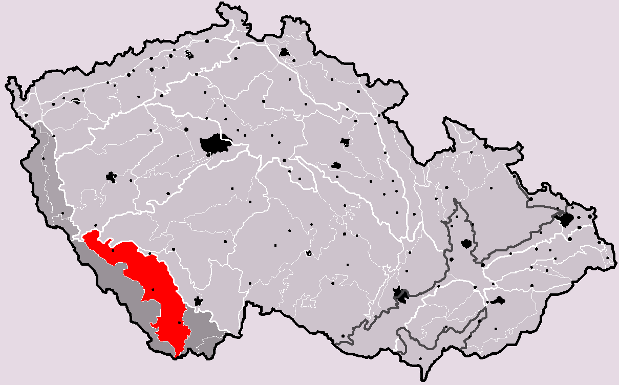 Poloha geomorfologického celku Šumavské podhůří v rámci České republiky. Hercynský systém Hercynská pohoří I Česká vysočina I1 (I) Šumavská subprovincie I1B (IB) Šumavská hornatina I1B-2 (IB-2) Šumavské podhůří